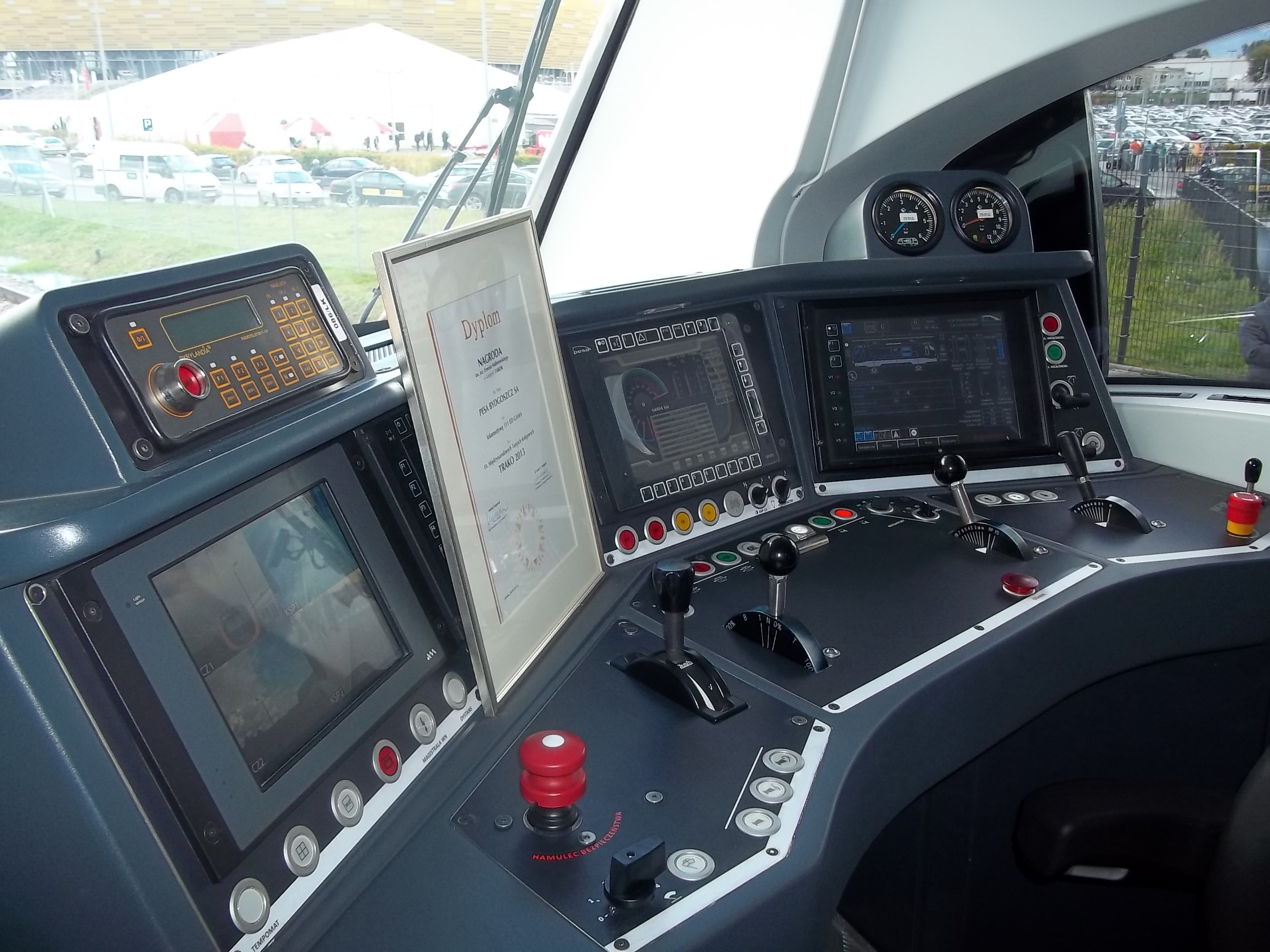 Wnętrze lokomotywy elektrycznej 4-osiowej o mocy 5600 kW zasilanej napięciem 3 kV DC, o oznaczeniu 111Ed "Gama", wyprodukowanej przez PESA Bydgoszcz S.A., wyposażonej w dodatkowy spalinowy system dojazdowy "Marathon", umożliwiający wykonywanie prac manewrowych na odcinkach niezelektryfikowanych.